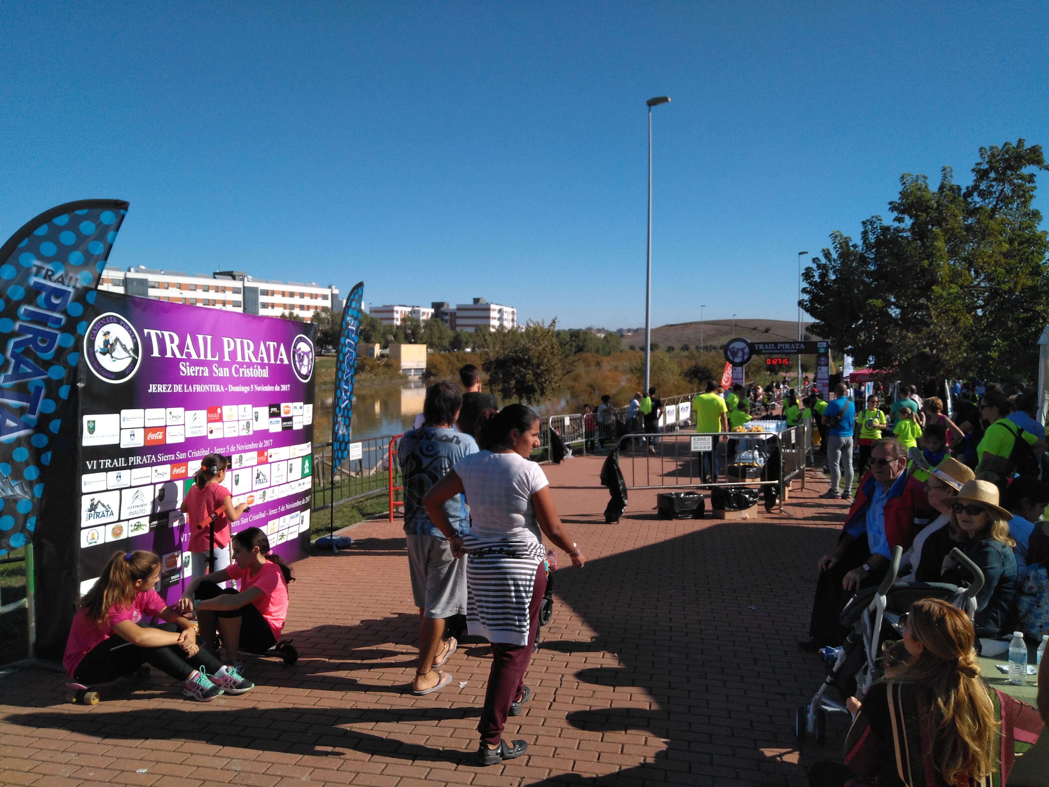 VI Trail Pirata sierra de San Cristóbal 2017, Laguna de Torrox en Jerez de la Frontera